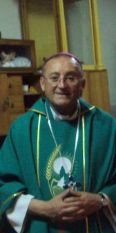 Obispo de San Felipe de Aconcagua, Chile.